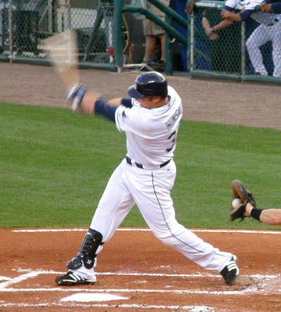 Eric Hinske